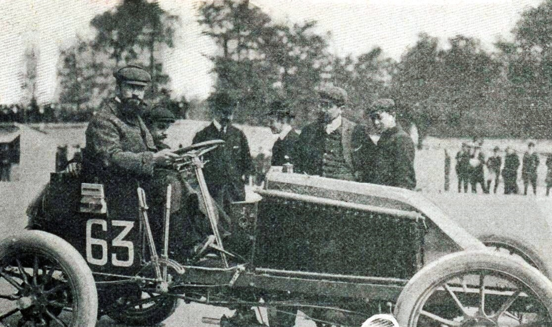 Marcel Renault au départ de Paris-Madrid 1903, La Vie au Grand Air du 29 mai 1903, p. 346